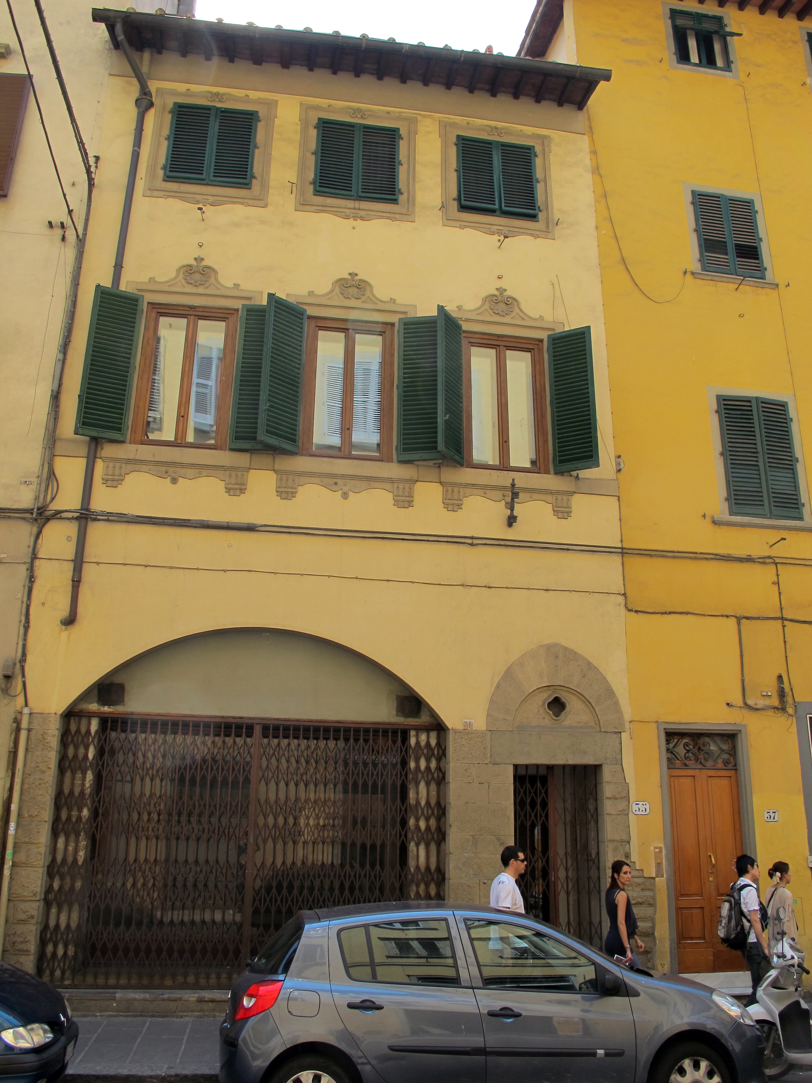 Corso tirntori 35, Ex-teatro dei Concordi